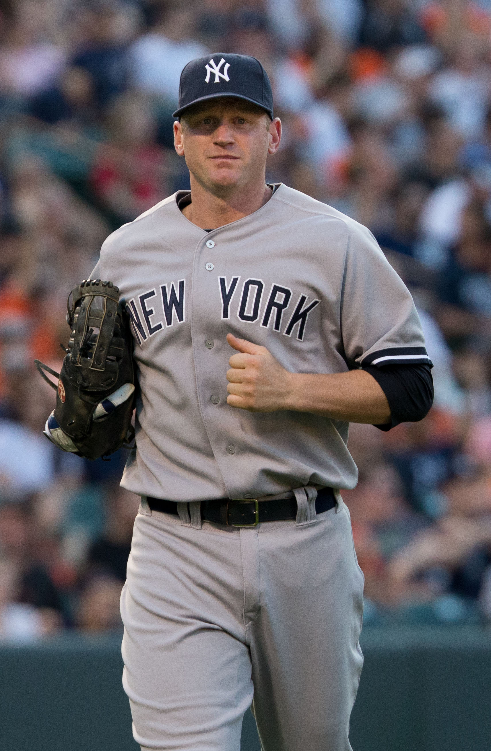 Lyle Overbay